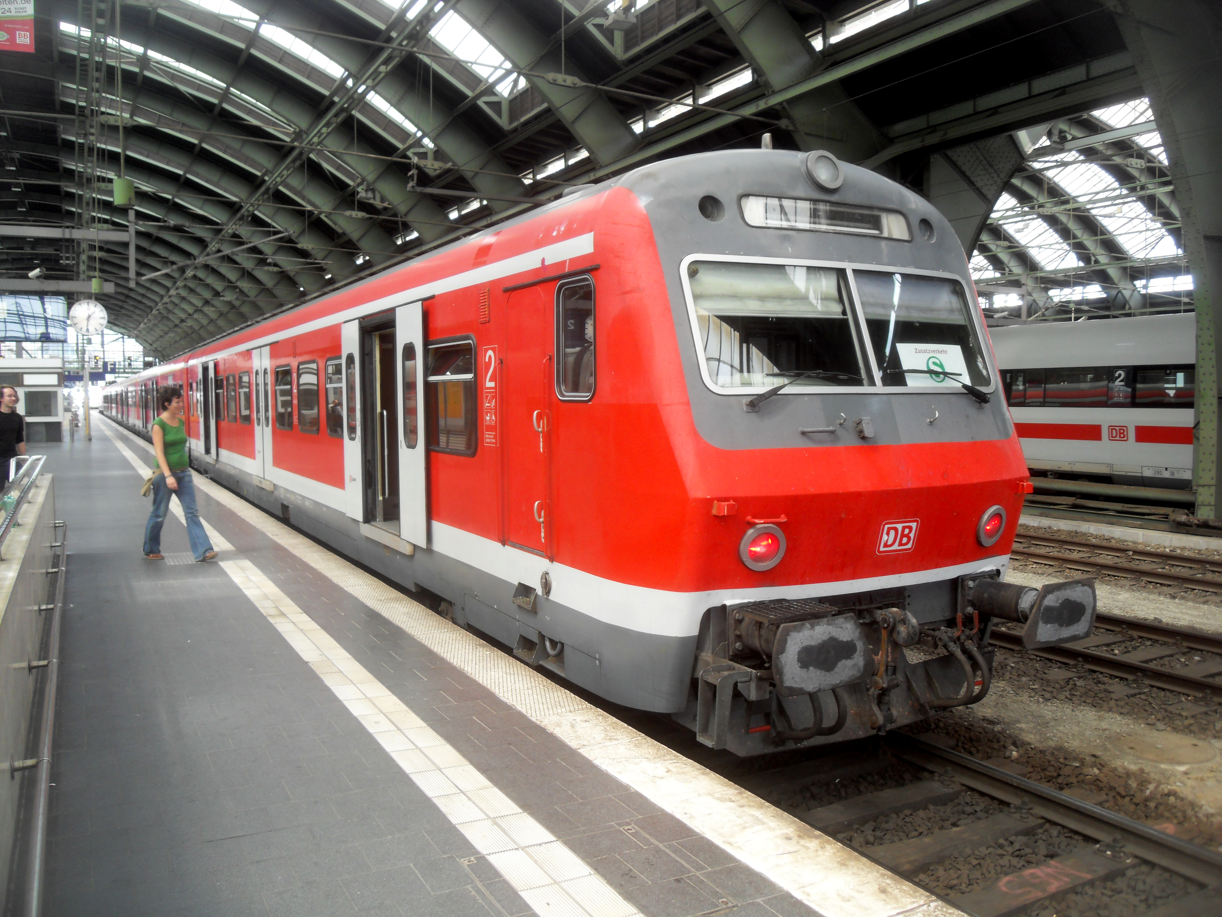 Ein Steuerwagen der X-Wagen (zu erkennen an den drei Türen und der im Gegensatz zu den Silberlingen eckigeren Wagenform) als Zusatzverkehr zur S-Bahn Berlin. Aufgenommen in Berlin Ostbahnhof Gleis 3.